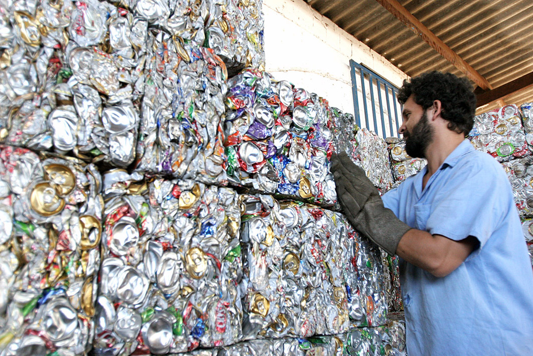 Reciclagem